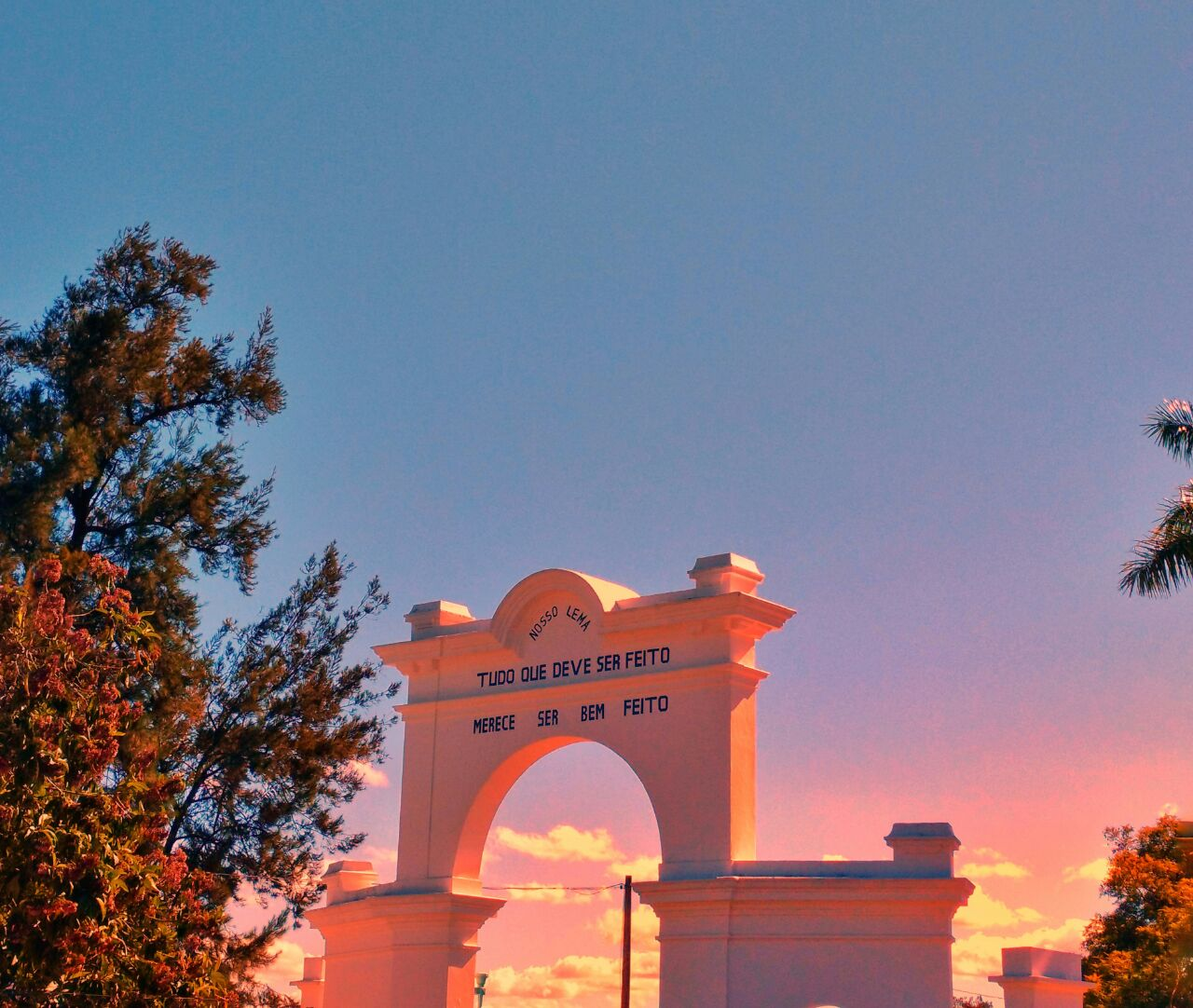 Batalhão.